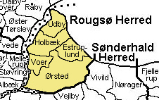 Rougsø Herred Randers Amt, Denmark Source: Map by Svend-Erik Christiansen